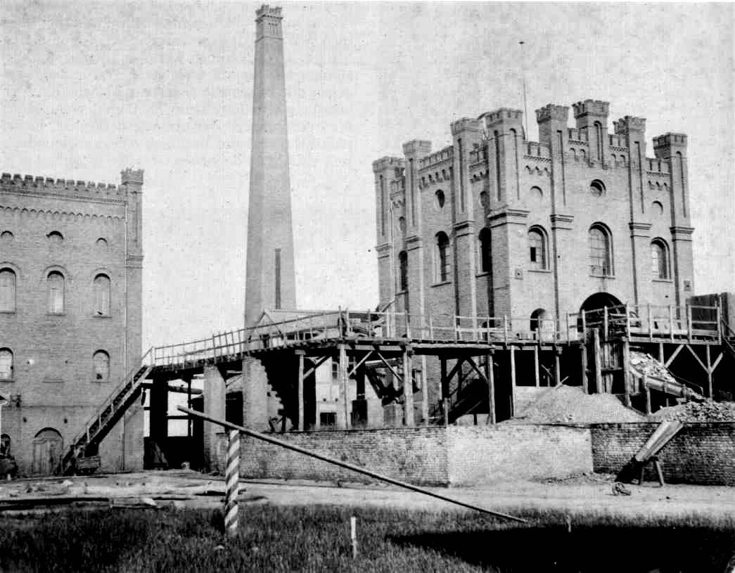 Malakov-Turm der Steinkohlegrube Teut bei Würselen um 1880